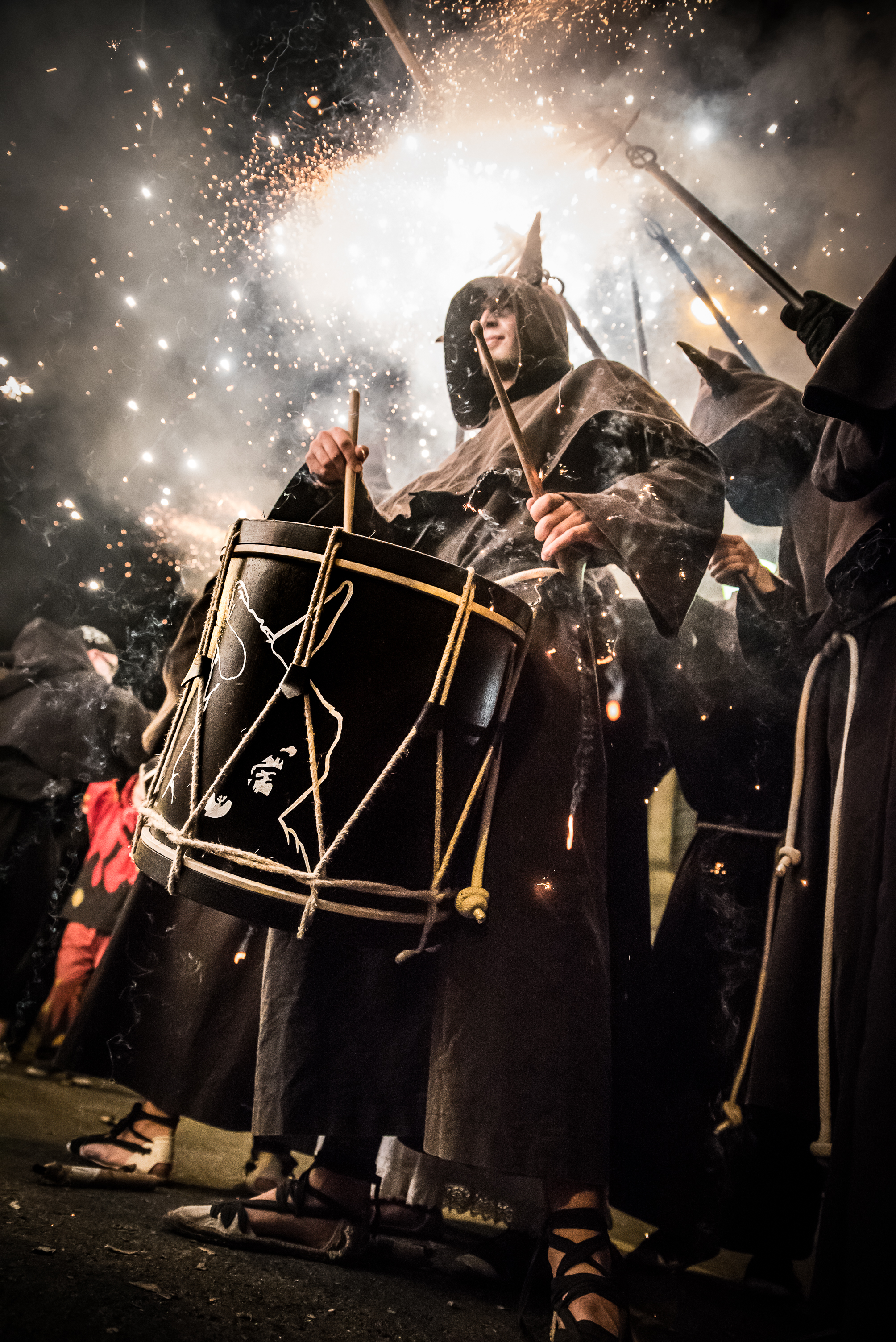 Tabaler de la Congregació Diabòlica del Congrés al final de su recorrido en el correfoc de la Festa de la Mercè 2017 This is a photography of a Folklore festival in Spain (Wikidata id Q3181317).